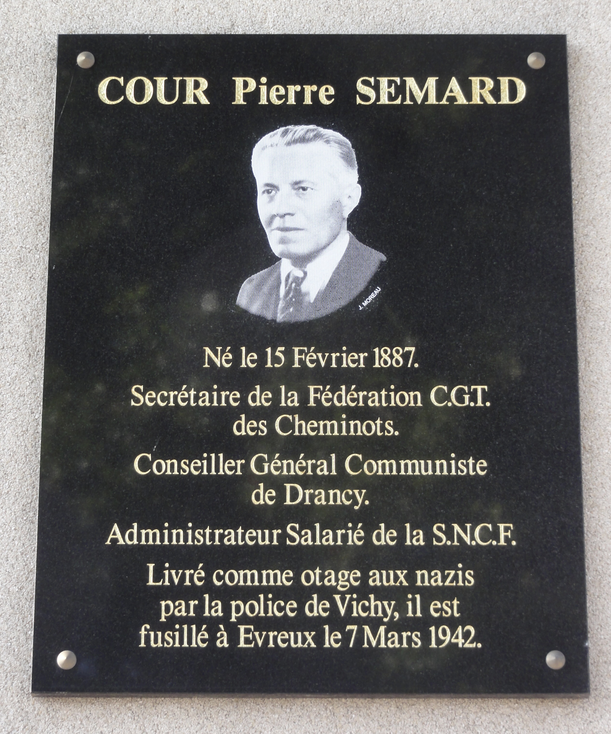 Tergnier (Aisne) gare SNCF, plaque à la mémoire de Pierre Semard.